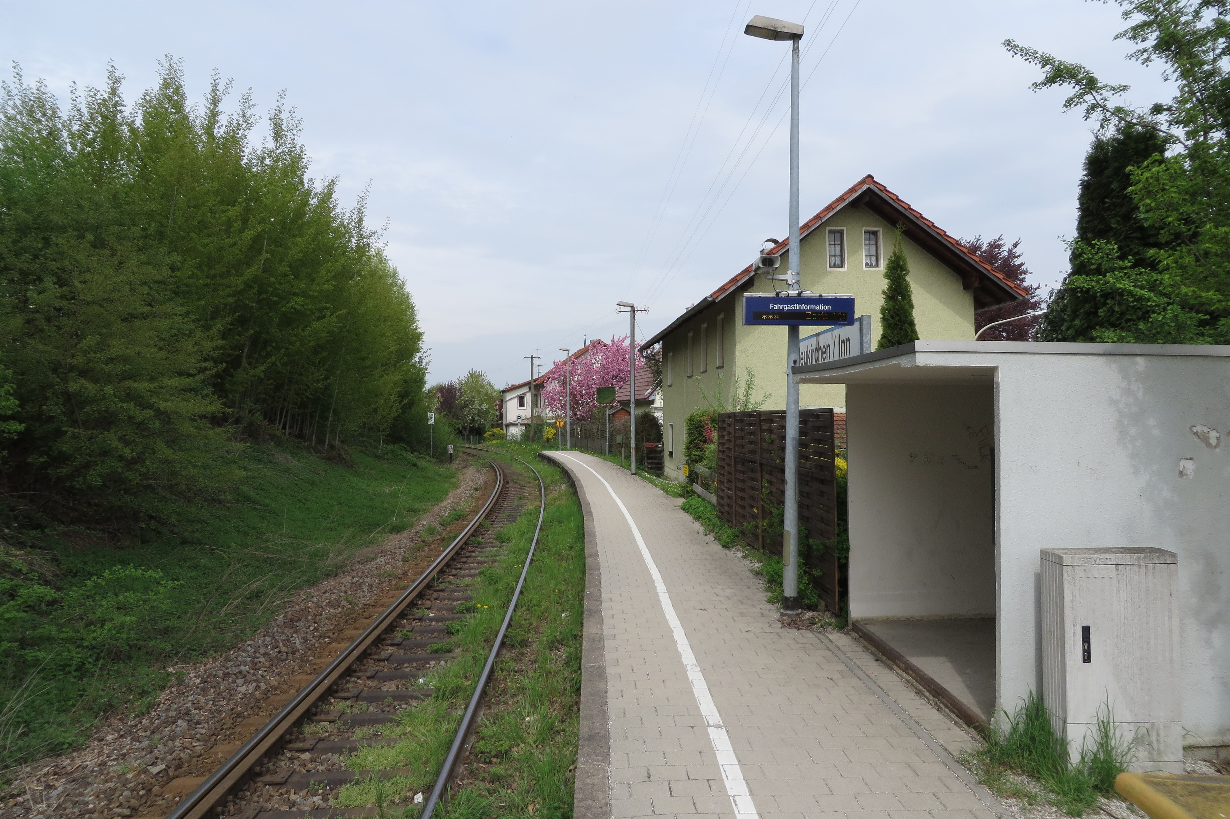 Haltepunkt der Bahnstrecke Passau–Neumarkt-Sankt Veit in Neukirchen am Inn